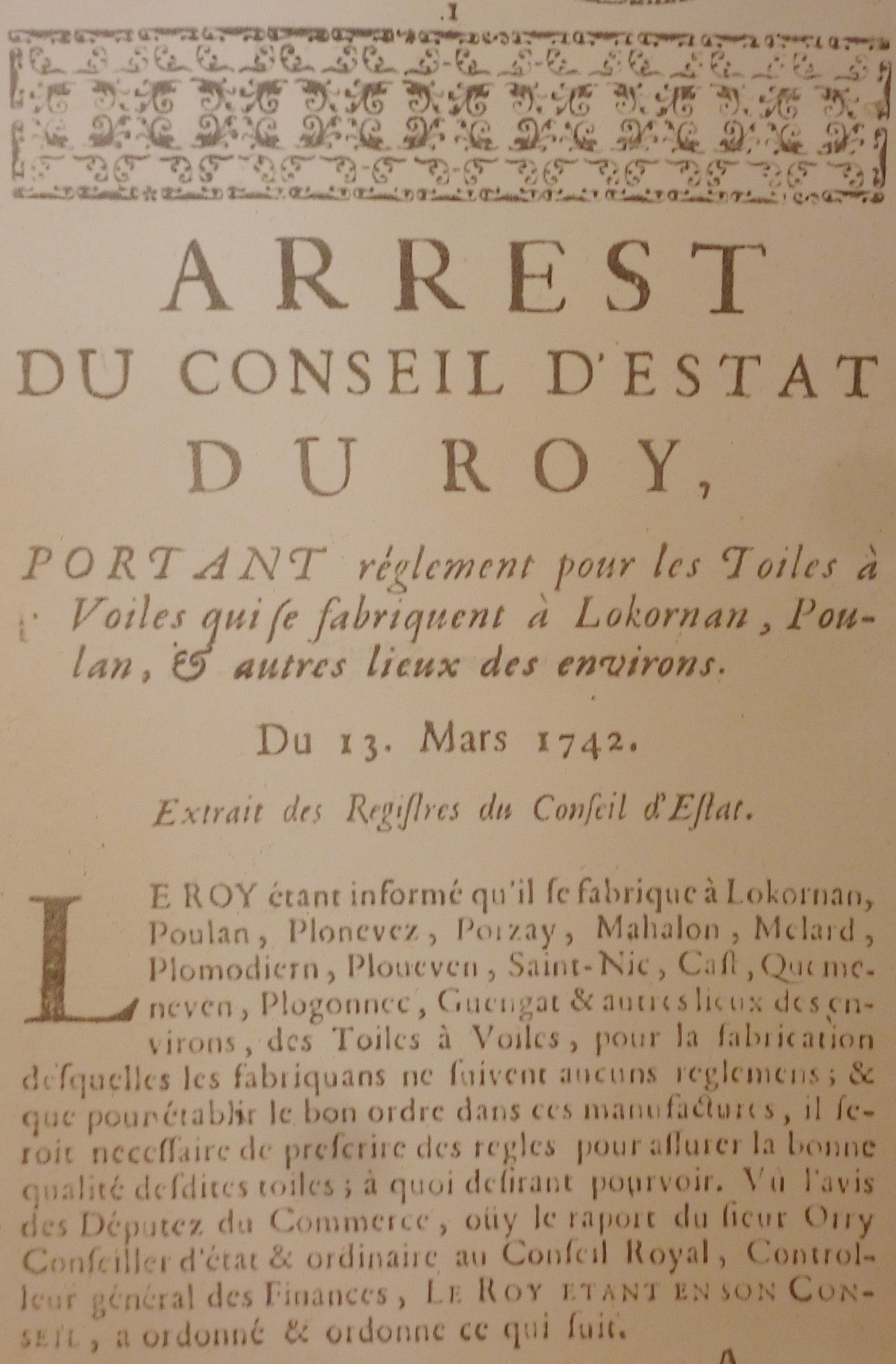 Arrêt du Conseil d'état du Roy datant de 1742 et portant règlement pour les toiles et voiles qui se fabriquent à Lokornan [Locronan], Poullan [Poullan-sur-Mer] et autres lieux des environs (musée de Locronan)